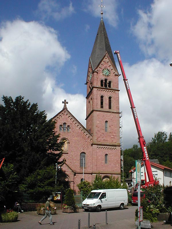 Evangelische Kirche in Bammental, erbaut 1904, hier im Juni 2007 bei Arbeiten zur Einbringung einer neuen Glocke